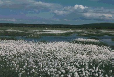 Paysage de Laponie en été (Laponie norvégienne juillet 1986)